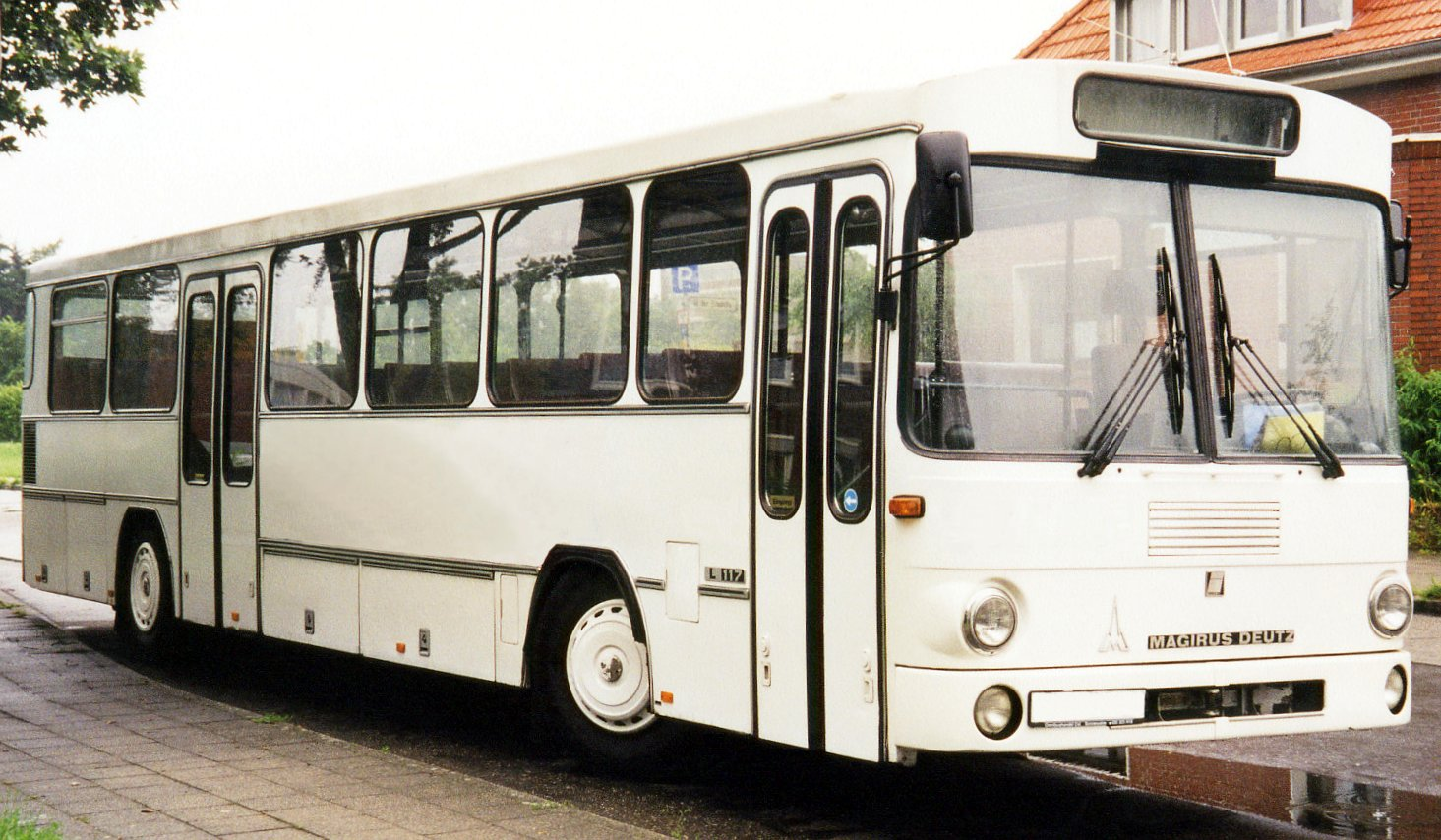 Magirus-Deutz L117 Überlandbus (VÖV-Bus)